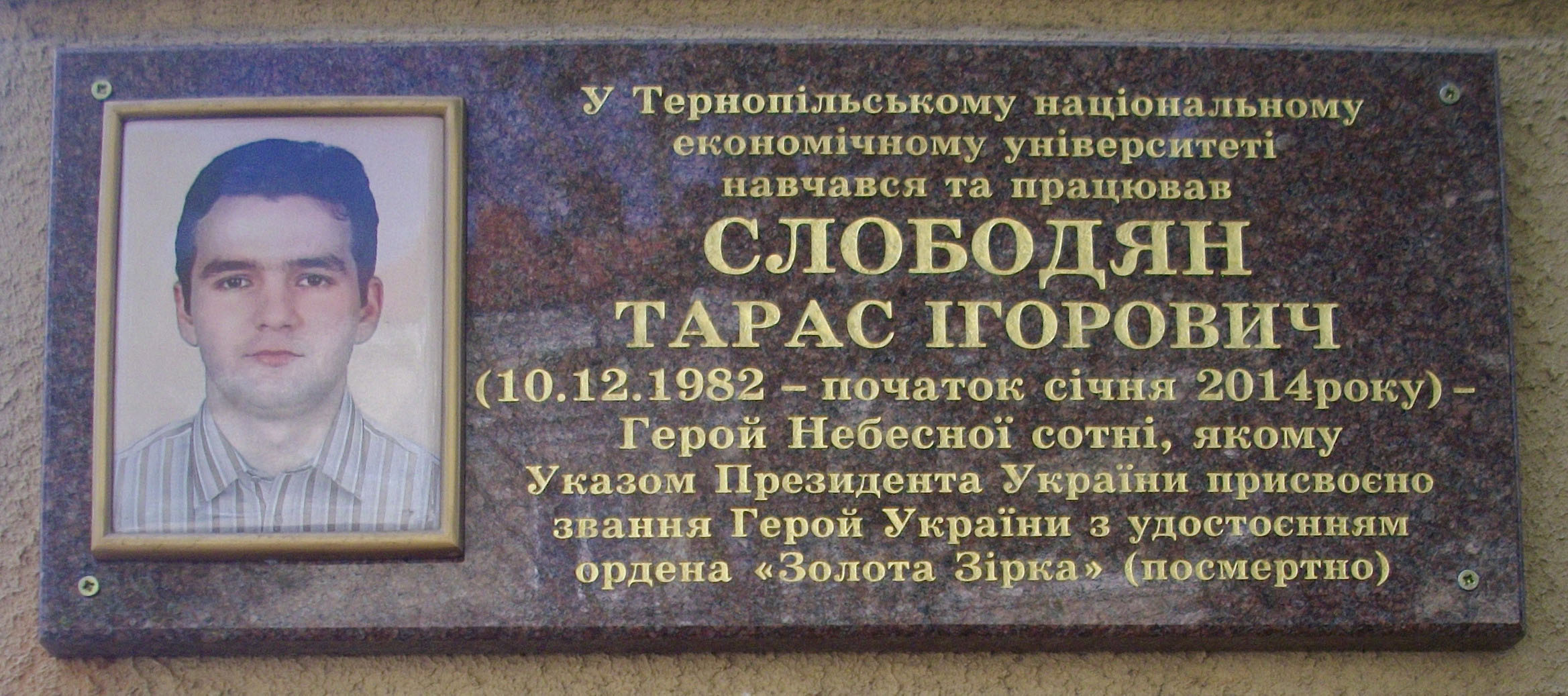 Пам'ятка дошка на корпусі Тернопільського національного економічного університету, де навчався та викладав Слободян Т.